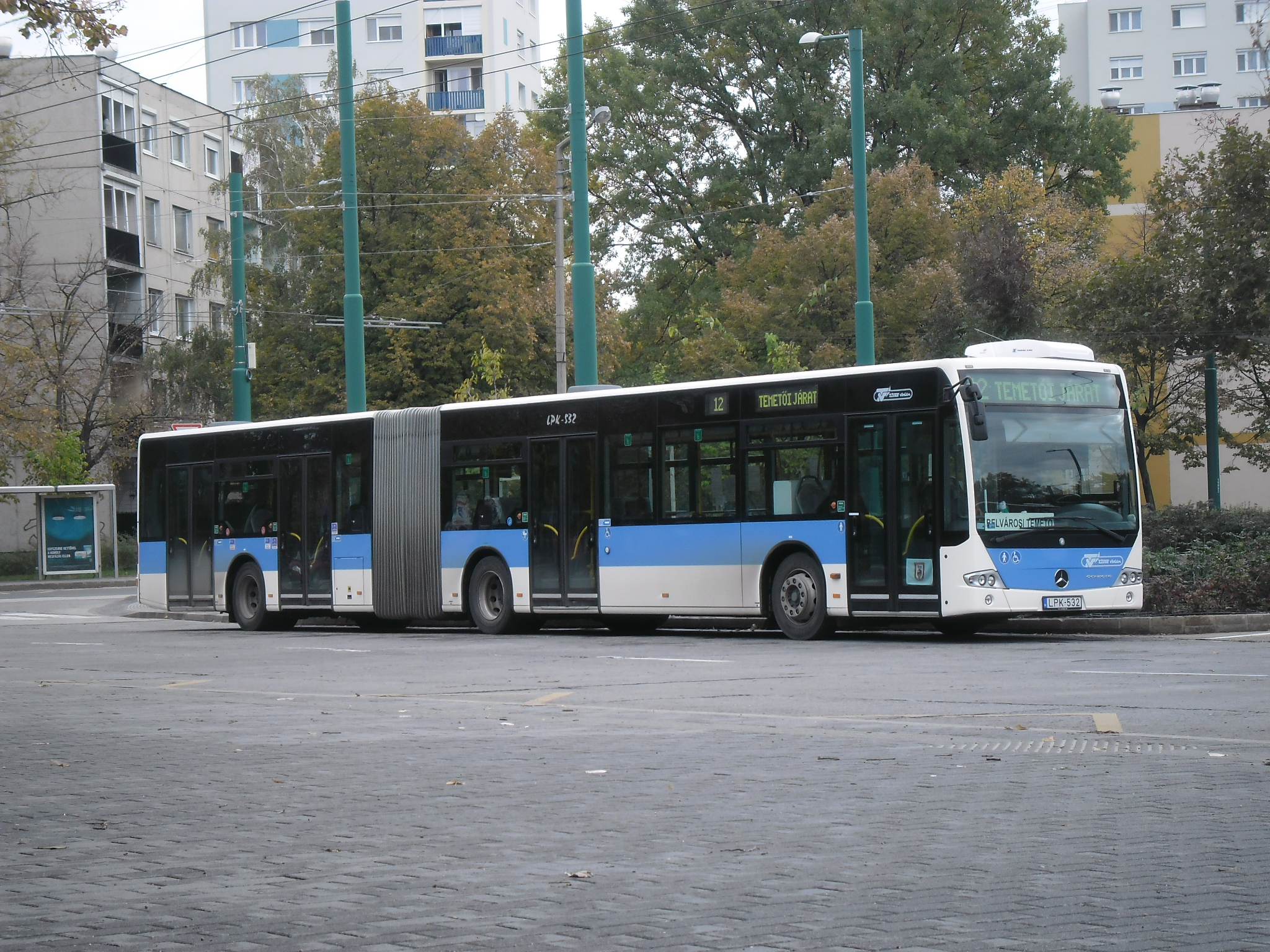 12-es (temetői járat), Szeged, Víztorony tér